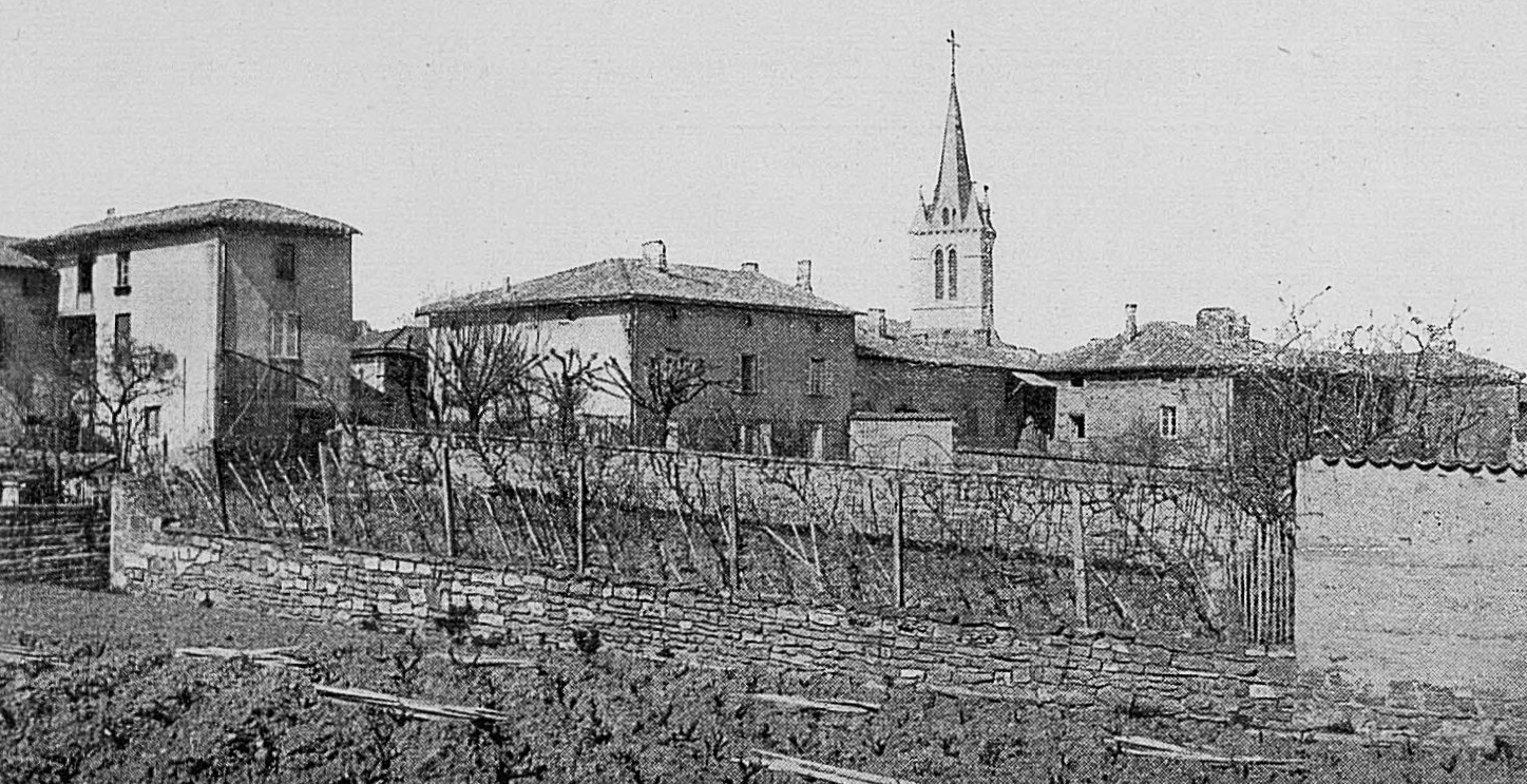 Dictionnaire illustré des communes du département du Rhône. Tome 1 / par MM. E. de Rolland et D. Clouzet.